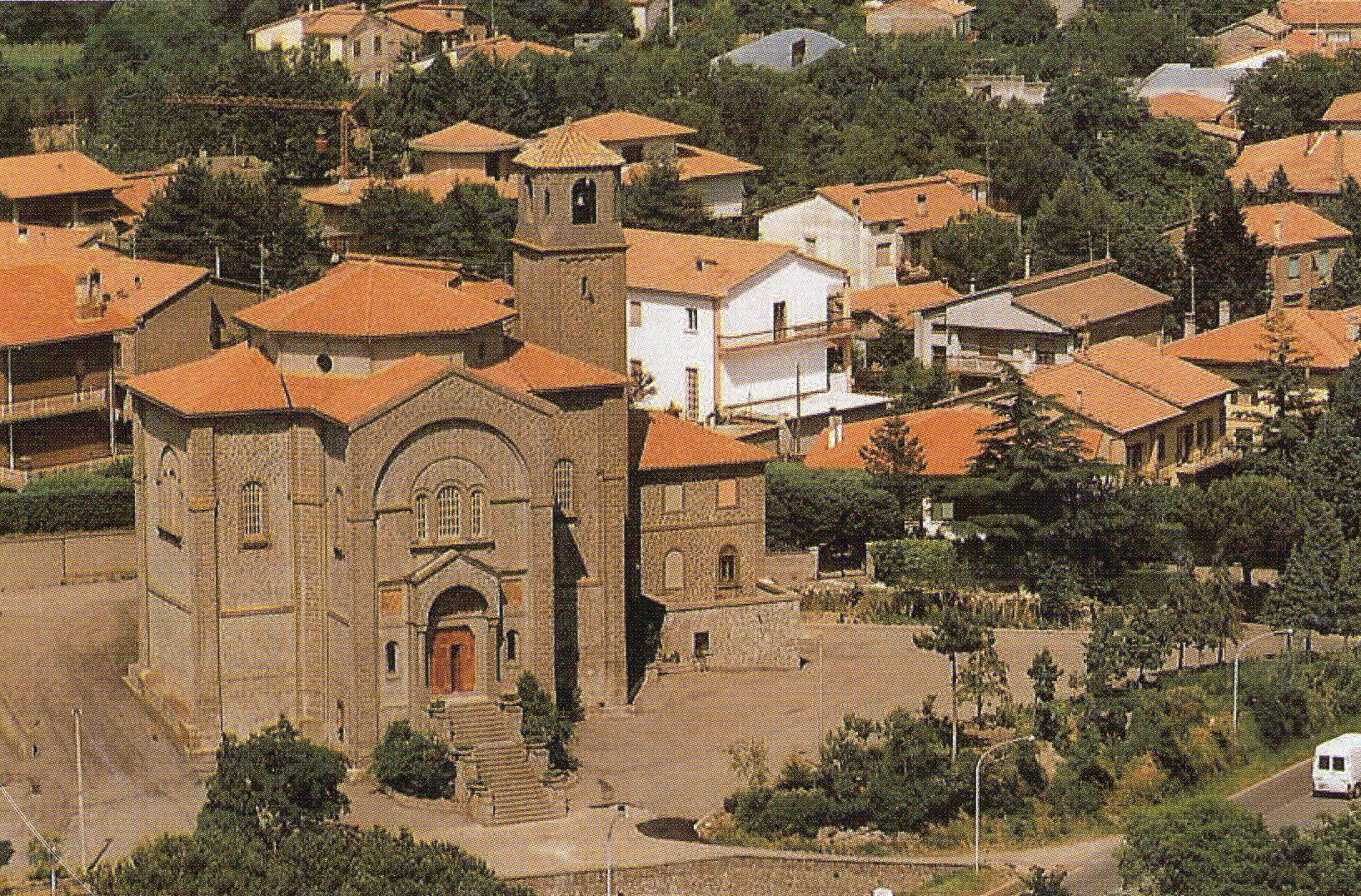 veduta dall'alto delle coste